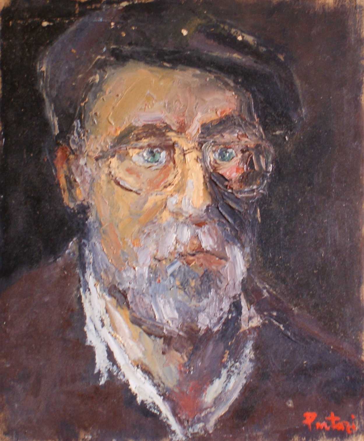 Portretul pictorului piteştean Gheorghe Pantelie executat de către pictorul bucureştan Valeriu Pantazi.